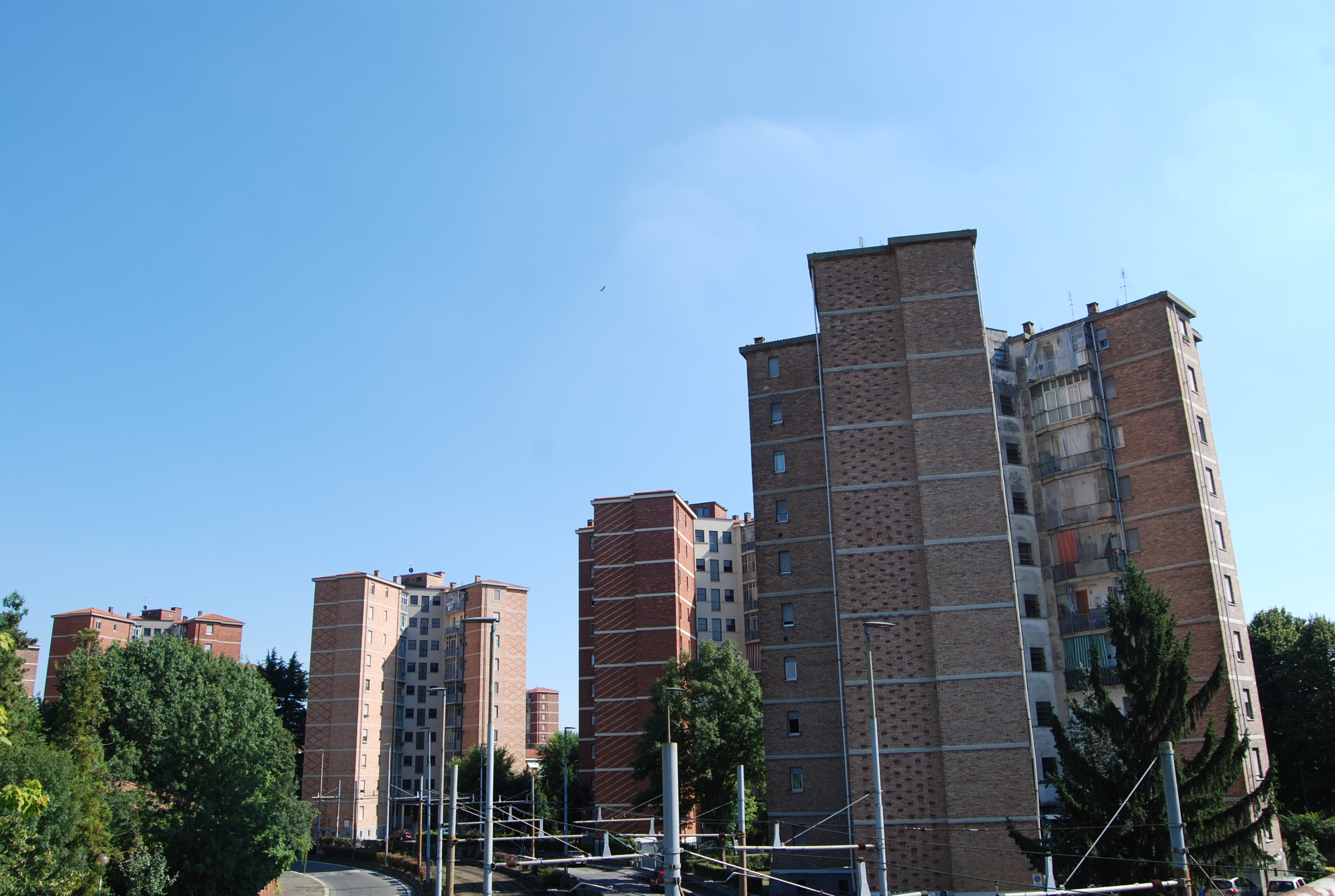 Le torri popolari delle Vallette situate su Viale dei Mughetti.